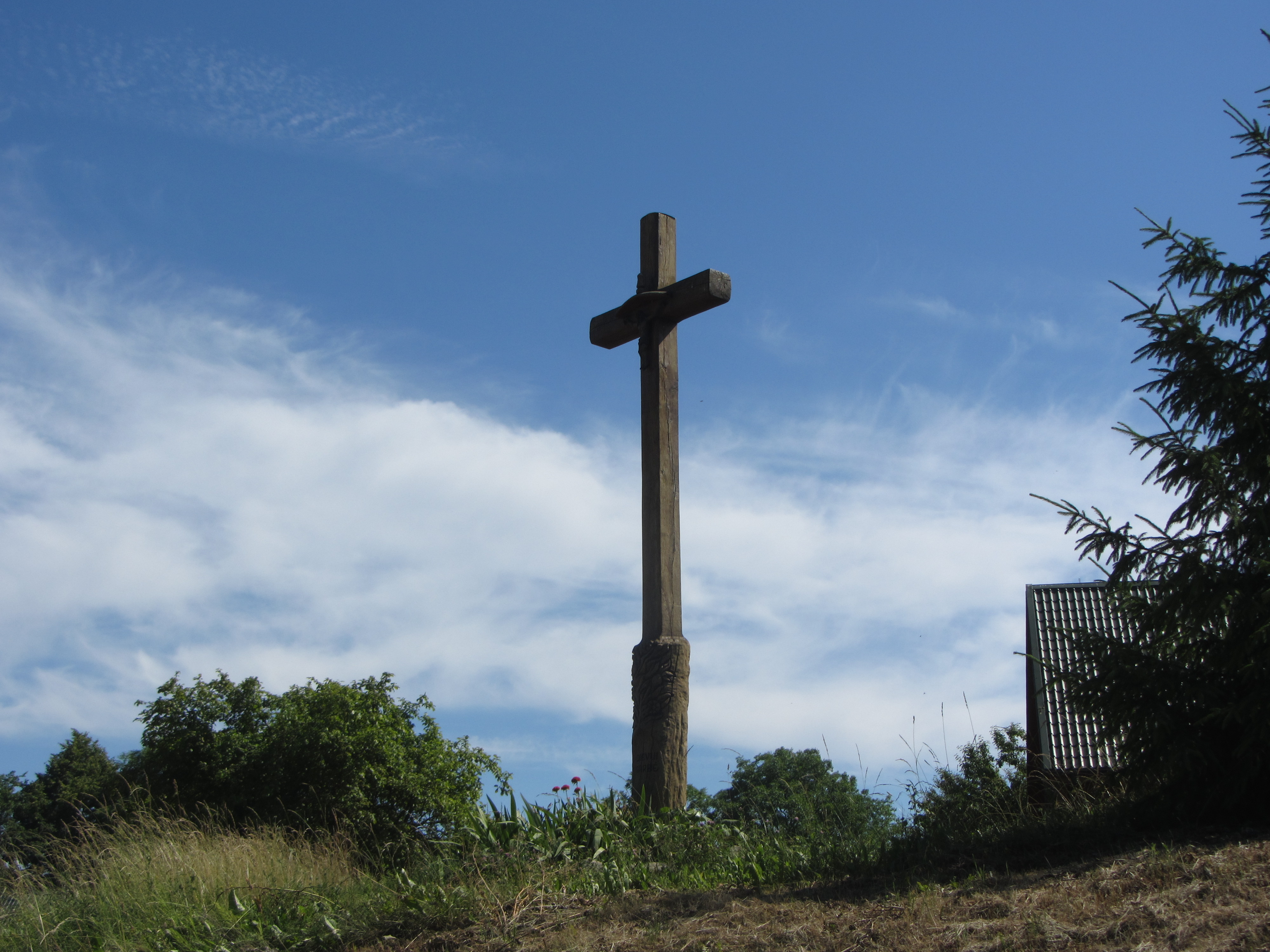 Semeliškių sen., Lithuania